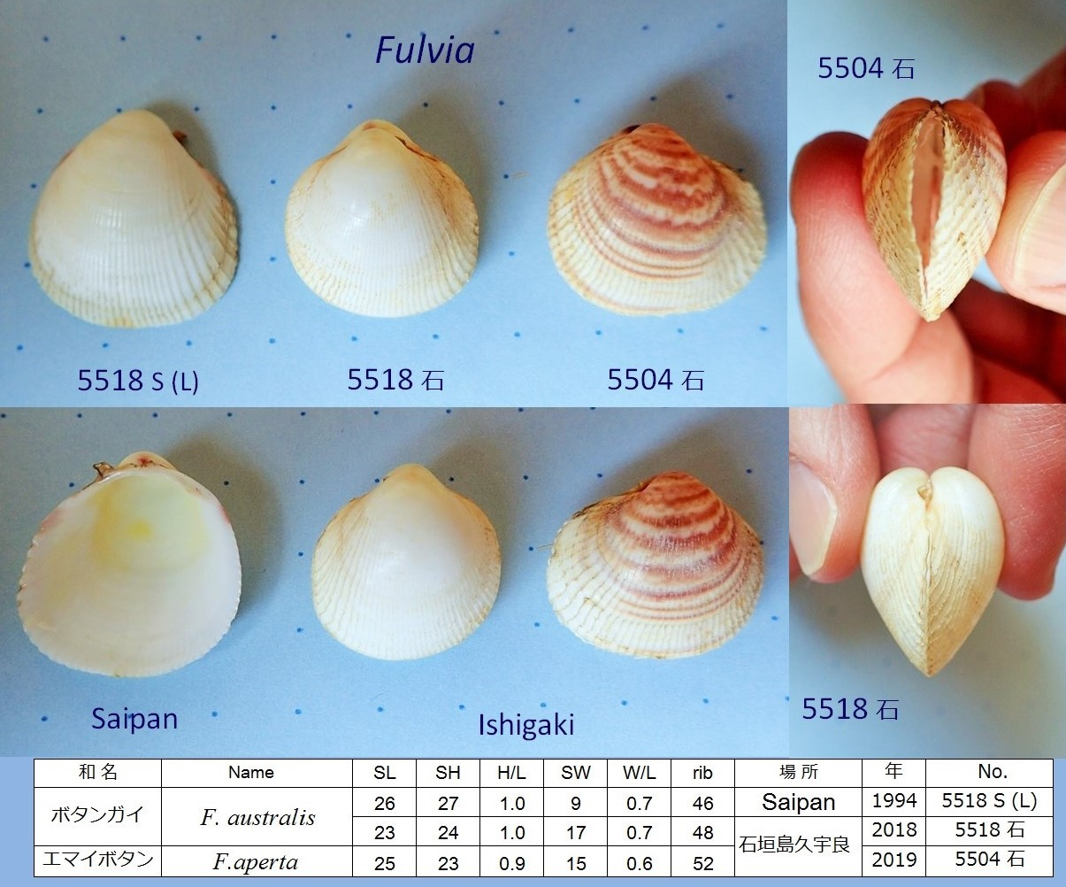 石垣島の久宇良と、サイパンのマイクロビーチで採取されたトリガイ属の貝。